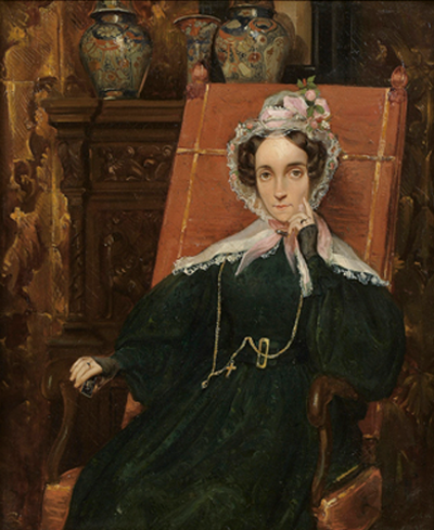 Céleste de Chateaubriand